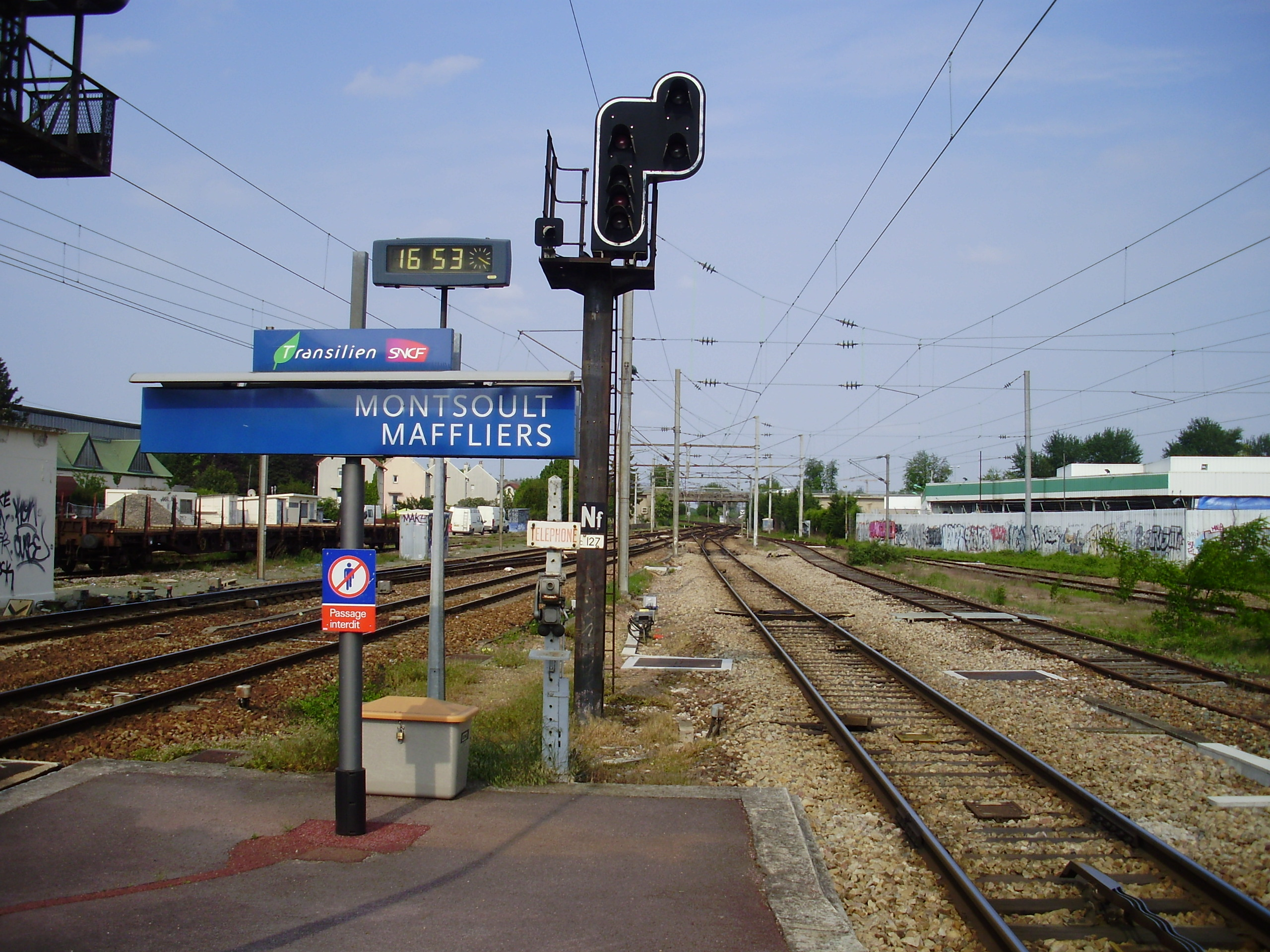 Gare de Montsoult - Maffliers, à Montsoult, Val-d'Oise, France : vue vers Persan - Beaumont / Luzarches depuis l'extrémité nord-est du quai des voies 2 et 4